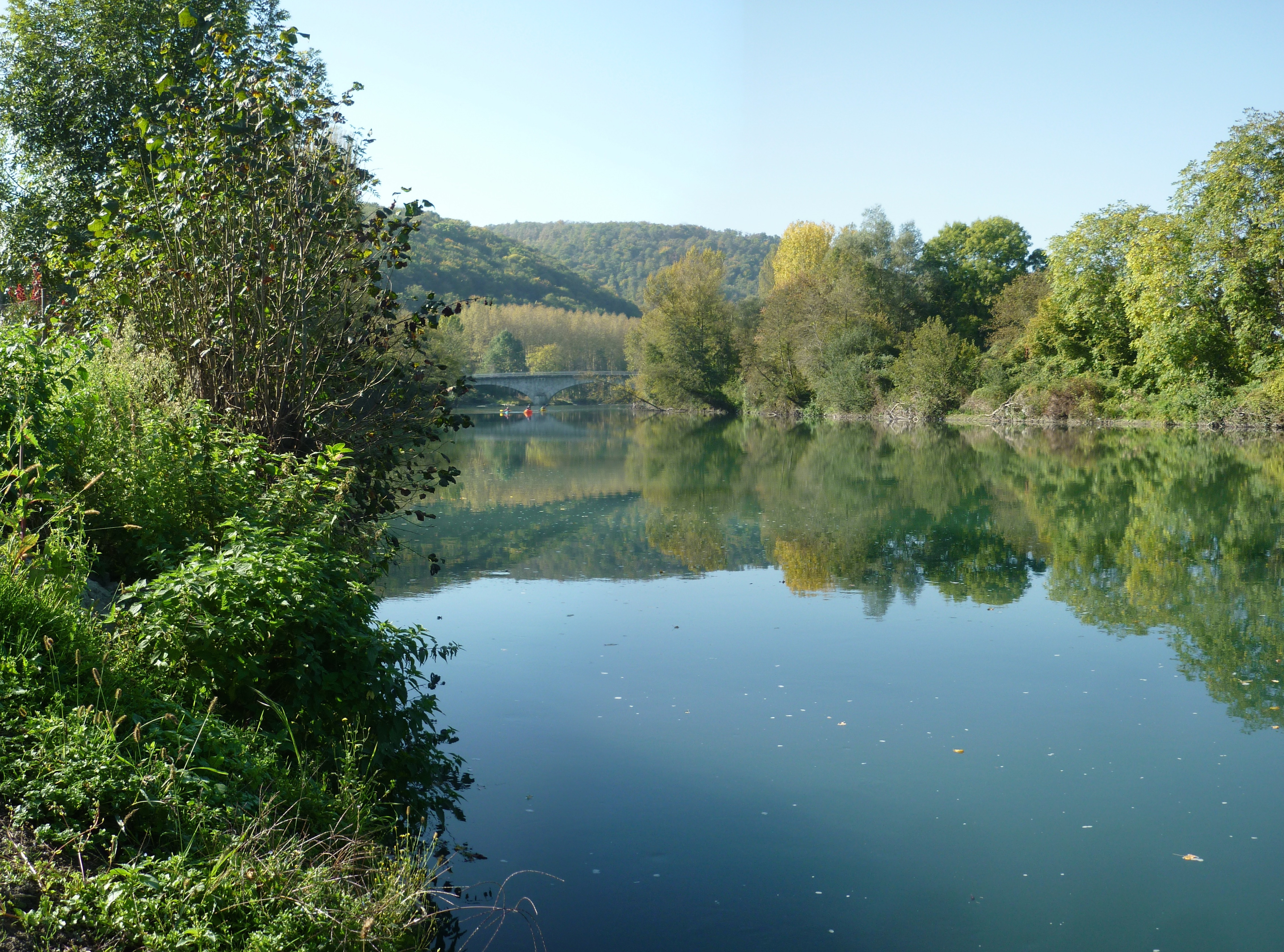 Arrivée de kayak sur la Garonne à Miramont-de-Comminges. 31800